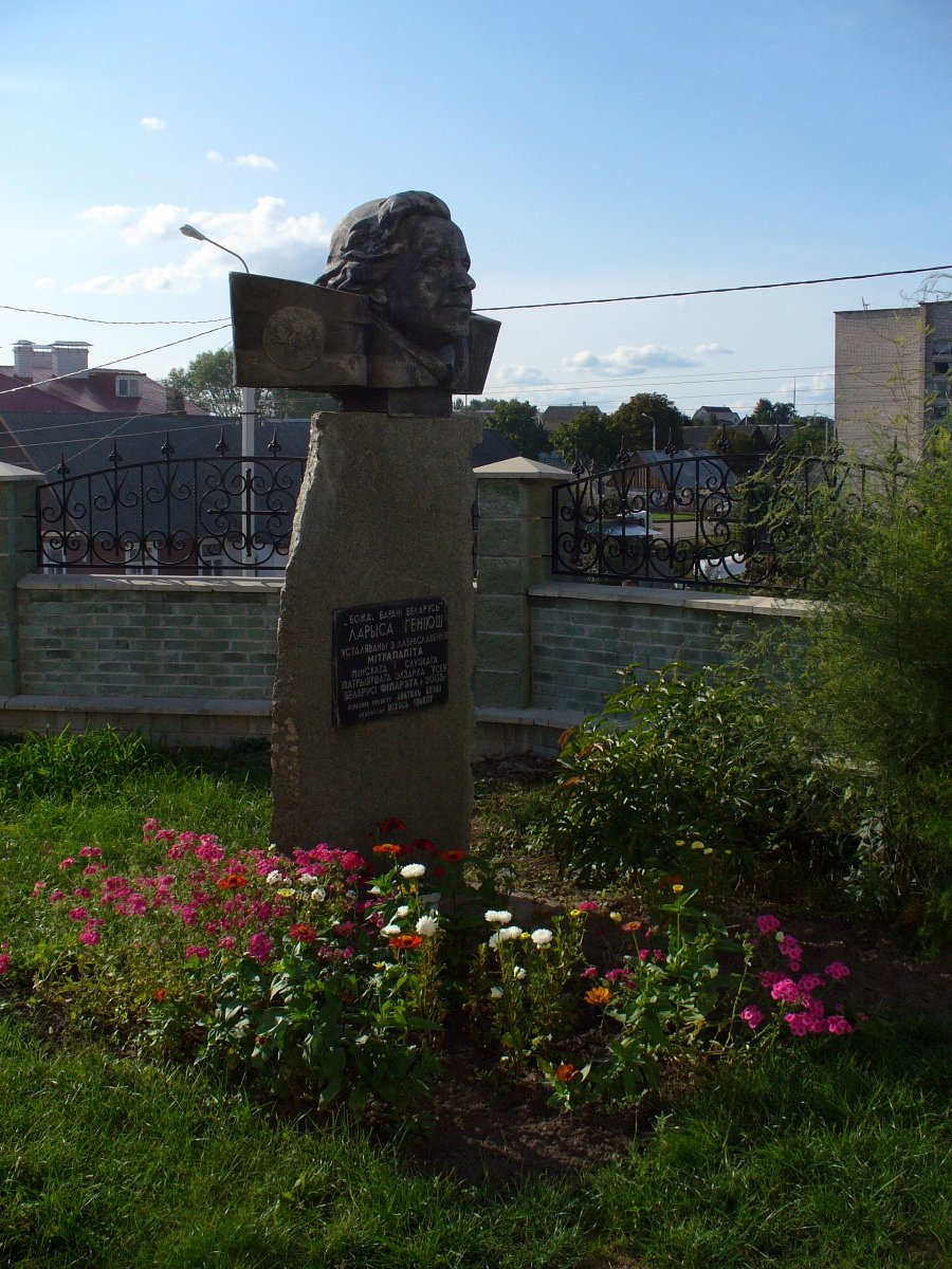 Зэльва. Царква. Помнік Ларысе Геніюш